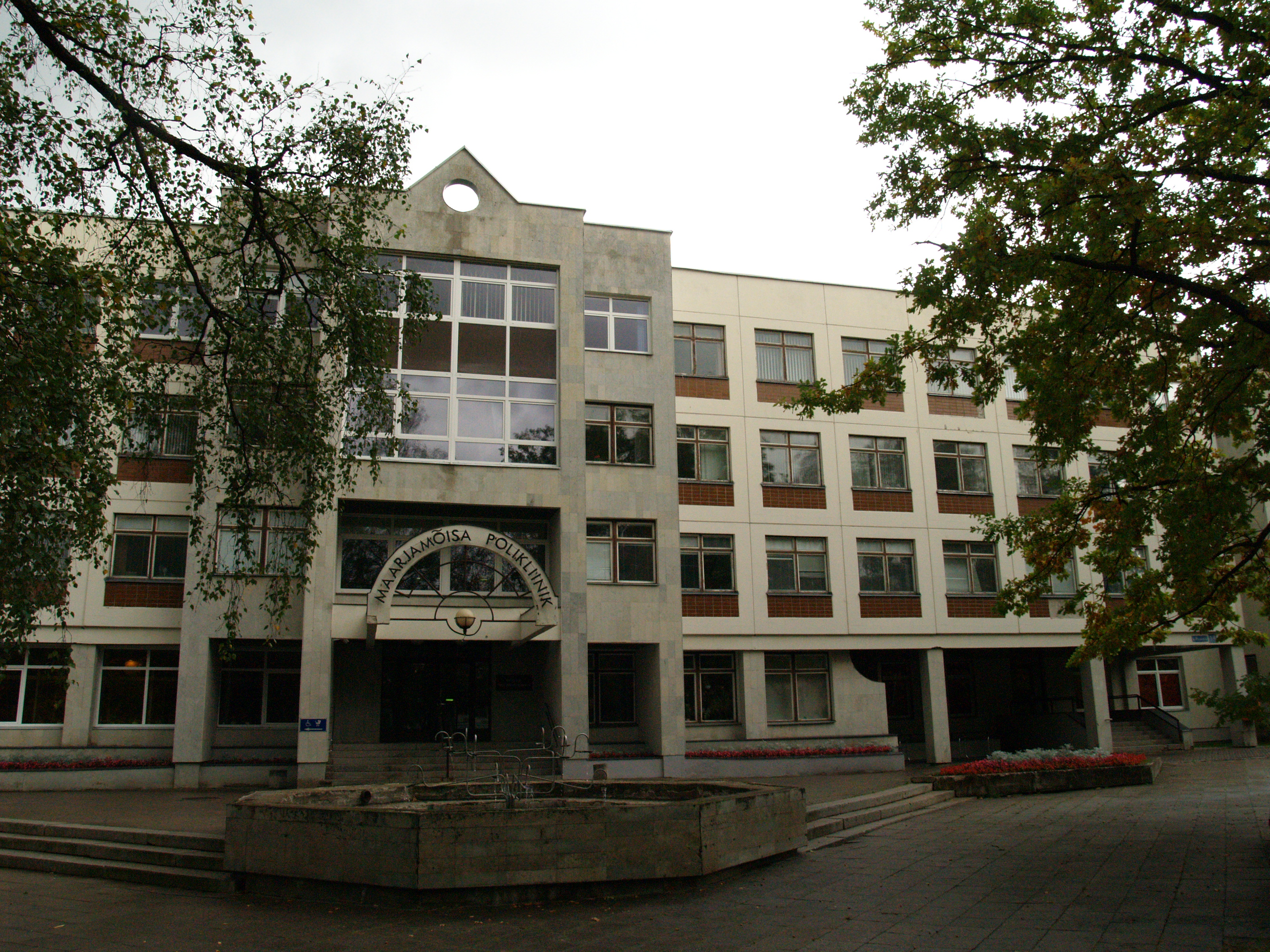 Maarjamõisa Polikliinik